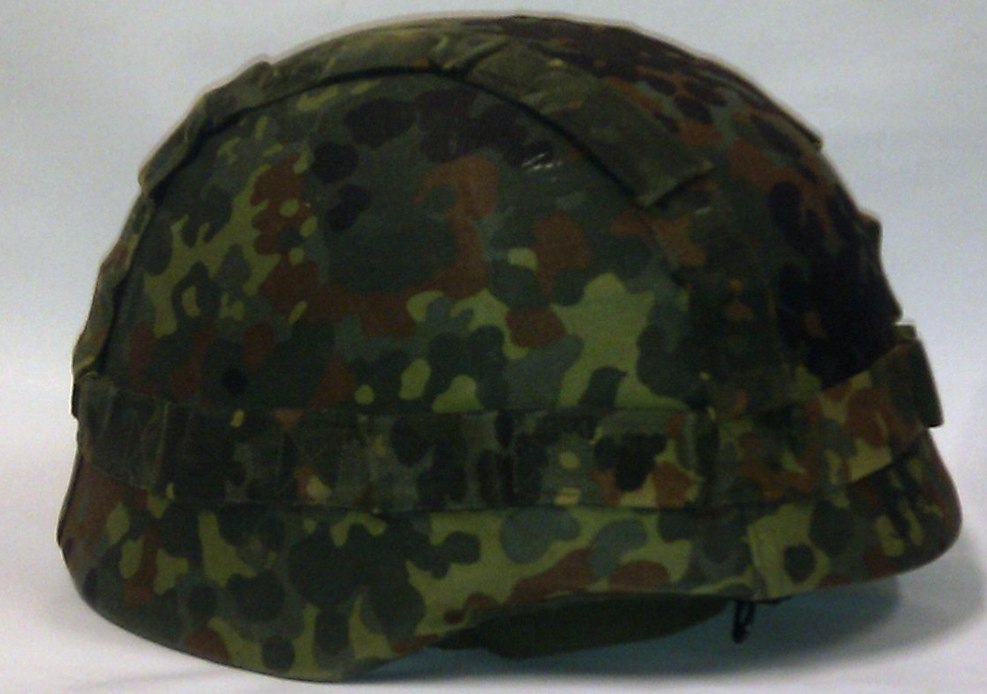 Gefechtshelm M92 mit 5-Farben-Tarndruck-Helmüberzug